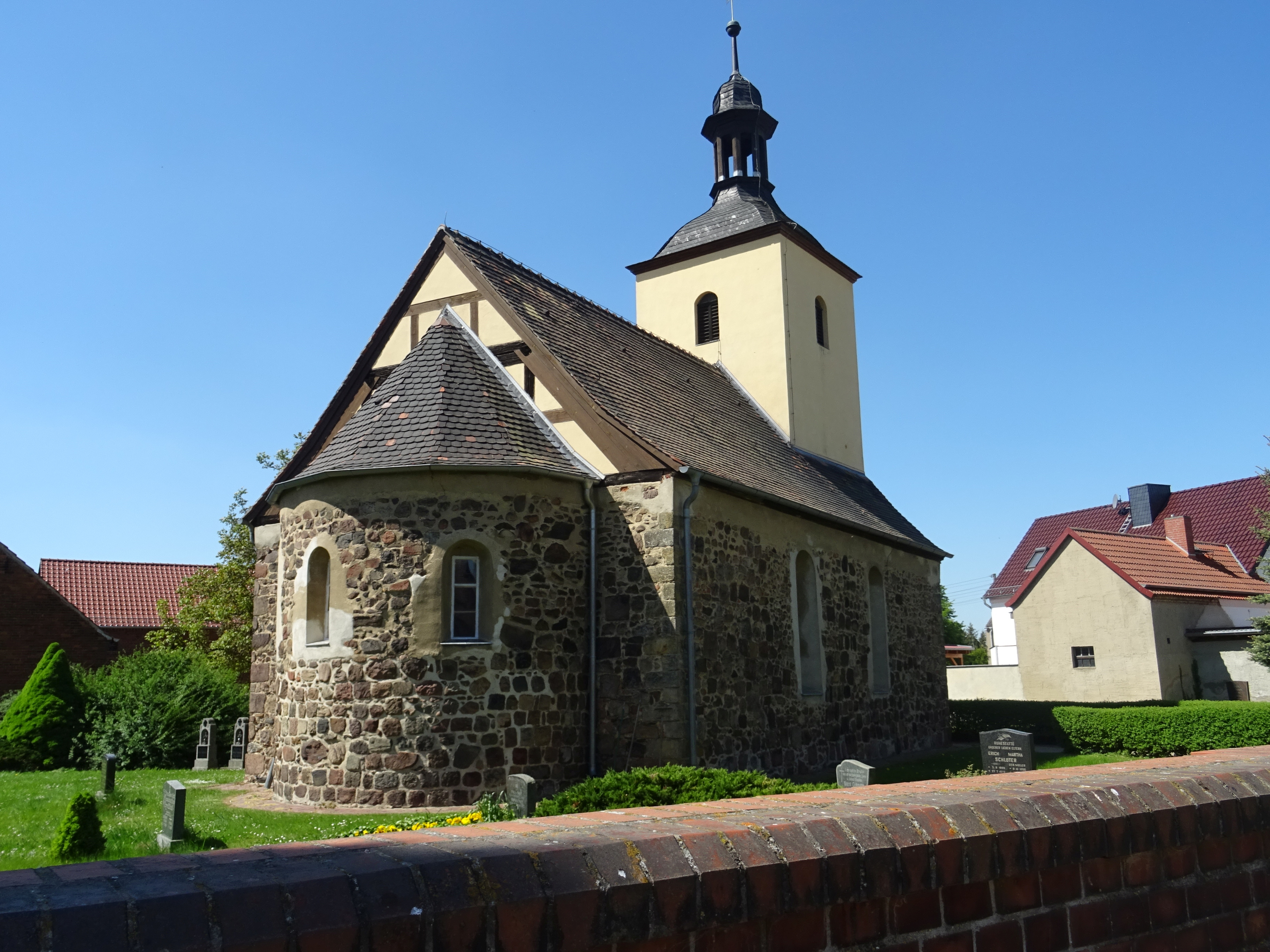 denkmalgeschützte Kirche in Naundorf bei Seyda